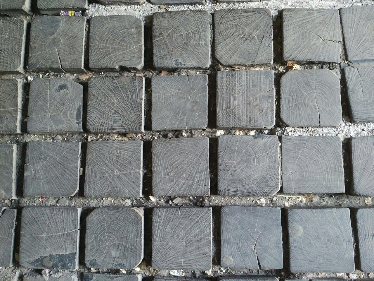 Az Unger-ház átjáróját (ma már csak részben) burkoló évszázados fakockák.